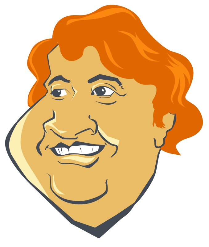 Caricatura de Dorotea Bárcena.